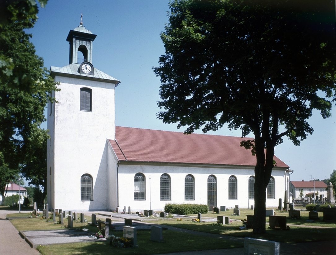 Svensljunga kyrka